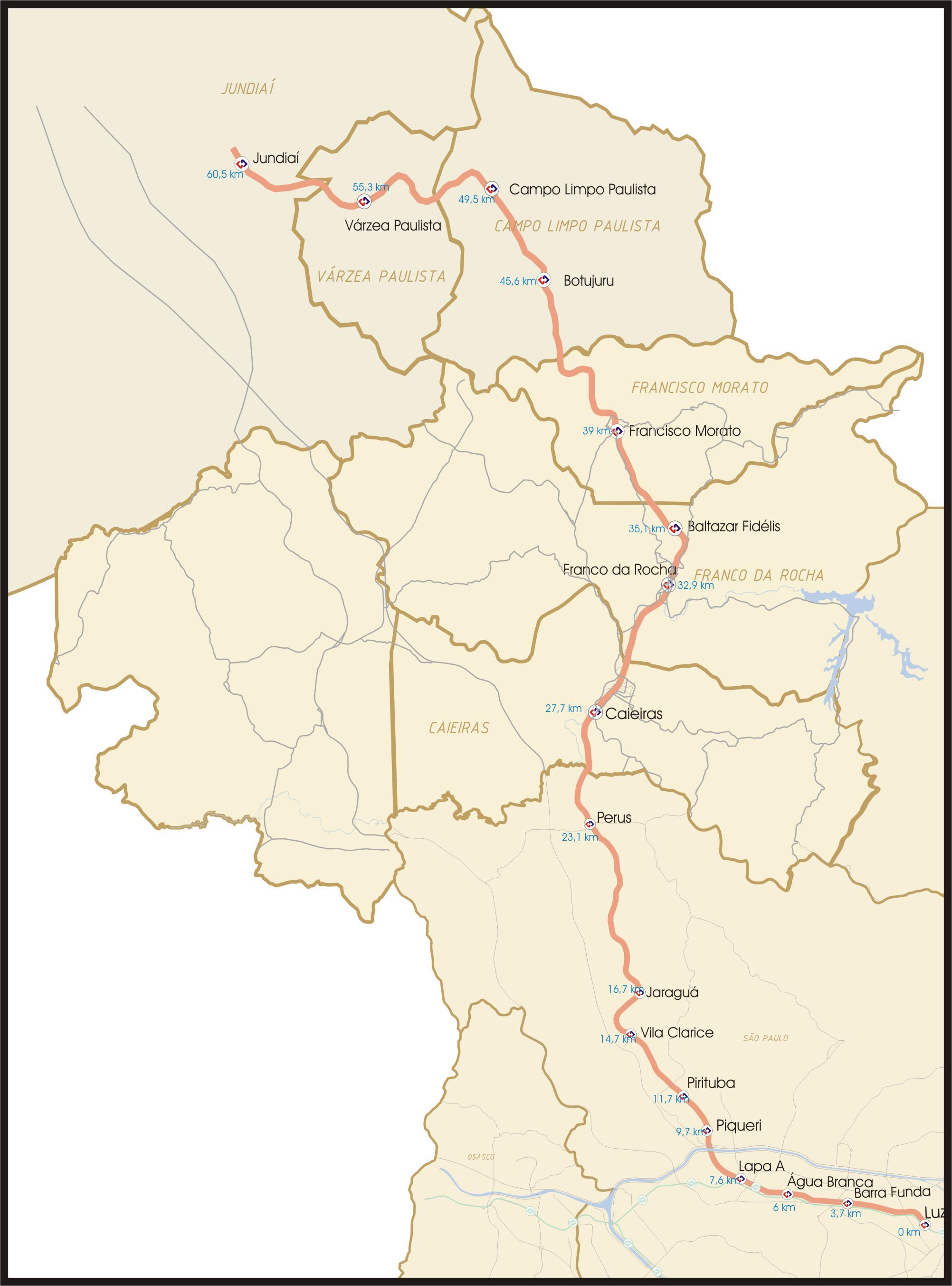 Linha A - Geo